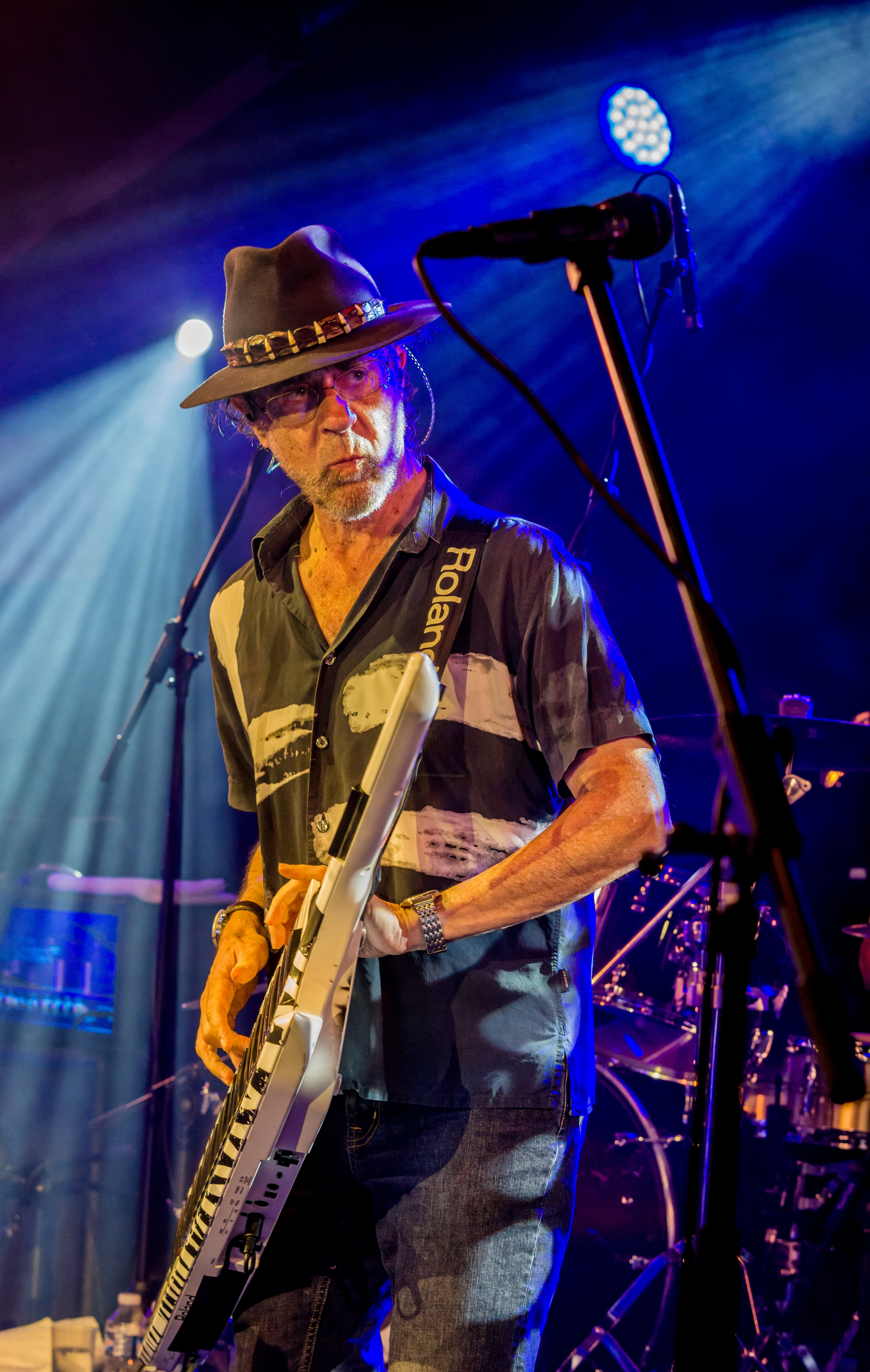 Bilder vom Zelt Musik Festival 2017 in Freiburg im Breisgau